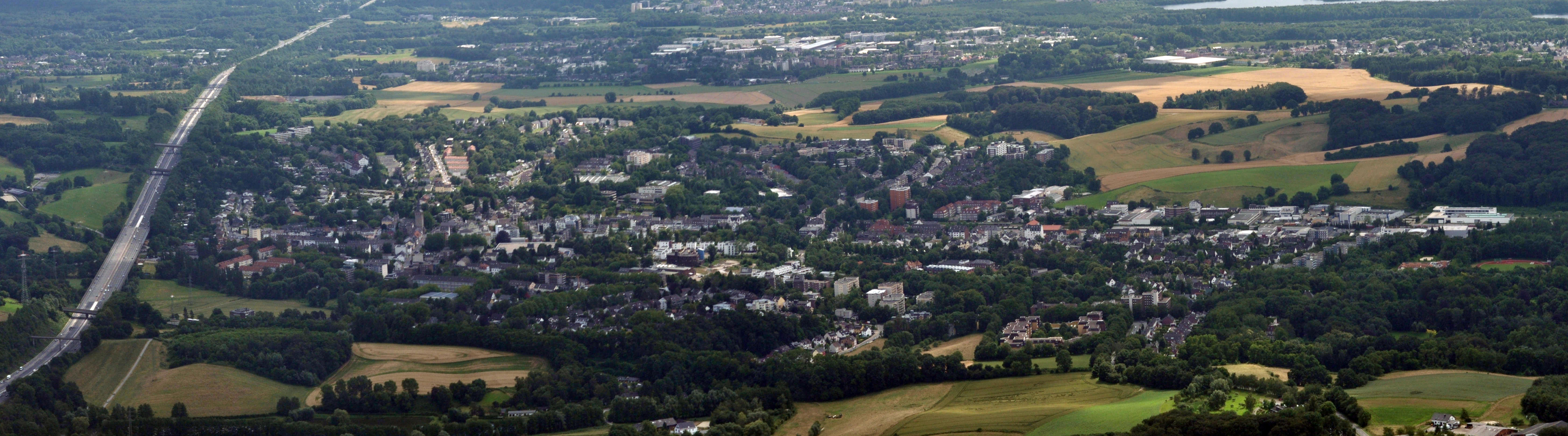 Erkrath, Deutschland. Links im Bild die Neandertalbrücke mit der Autobahn A3. Blick nach Süden. Luftbild aus ca. 600m Höhe über Grund.